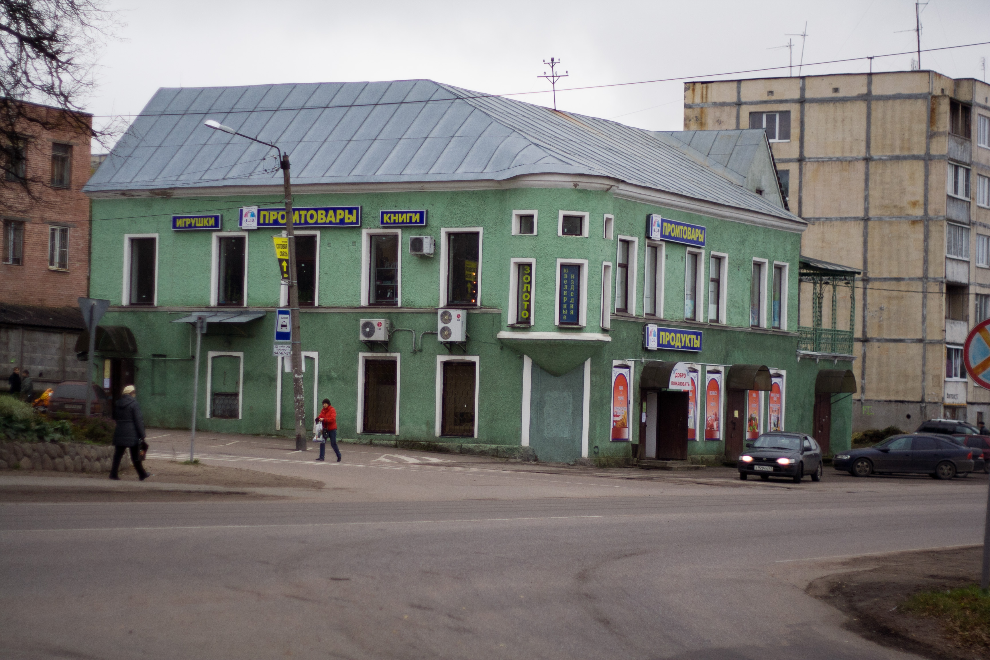 Магазин № 12 Рощинского РАЙПО, пгт Рощино, улица Советская 29